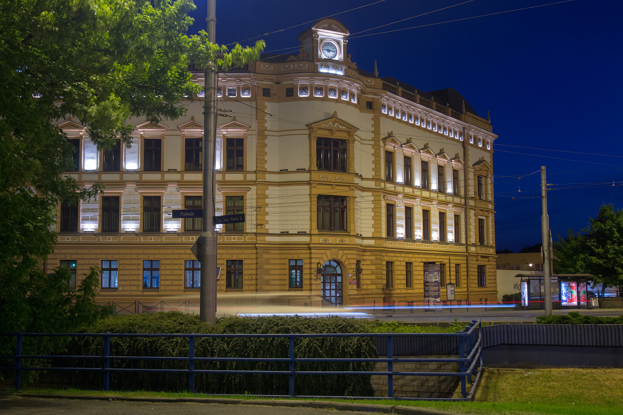 Wrocław, Śląskie Towarzystwo Ubezpieczeń Przeciwpożarowych, ob. Akademia Muzyczna Wikidata has entry Q30059324 with data related to this item.